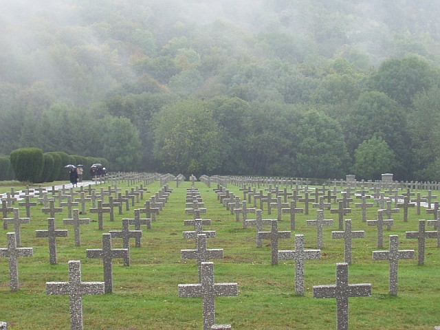 Gedenkstätte Hartmannswillerkopf